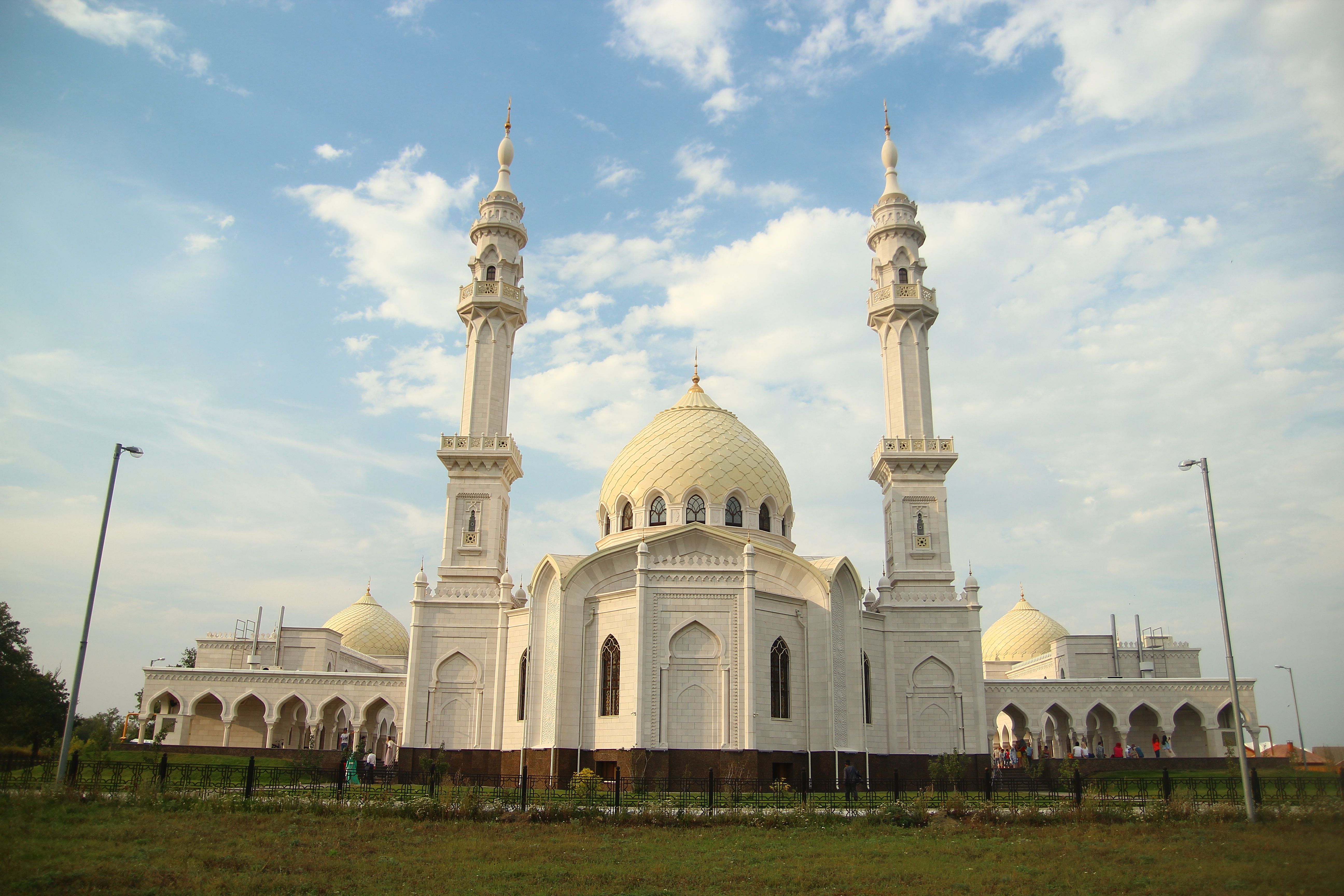 Белая мечеть, Болгар, Татарстан